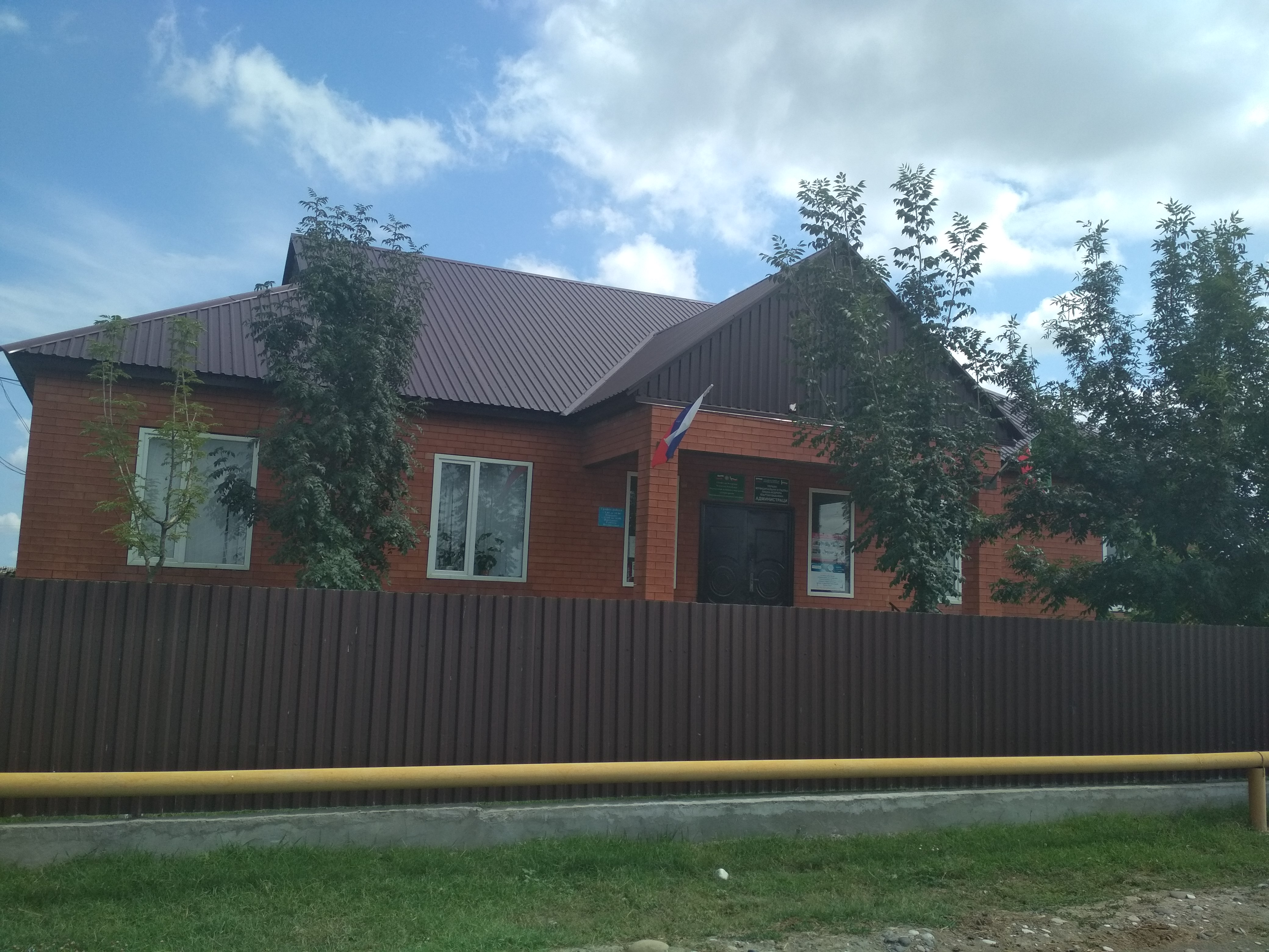 Нохчийн: Лакха Неврен администраци